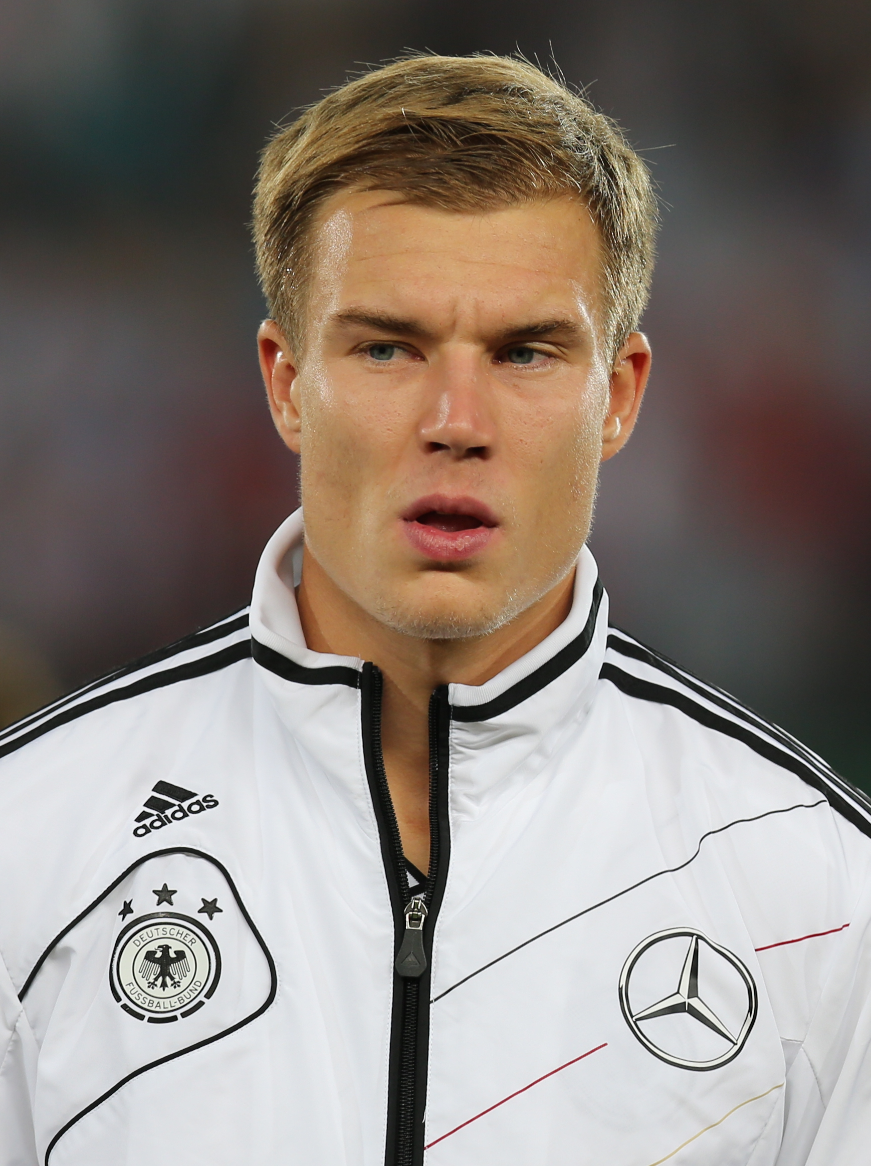 Fußball-Weltmeisterschaft 2014/Qualifikation (UEFA), Gruppe C, 11. September 2012, Österreich gegen Deutschland im Wiener Ernst-Happel-Stadion. The making of this work was supported by Wikimedia Austria. For other files made with the support of Wikimedia Austria, please see the category Supported by Wikimedia Österreich.